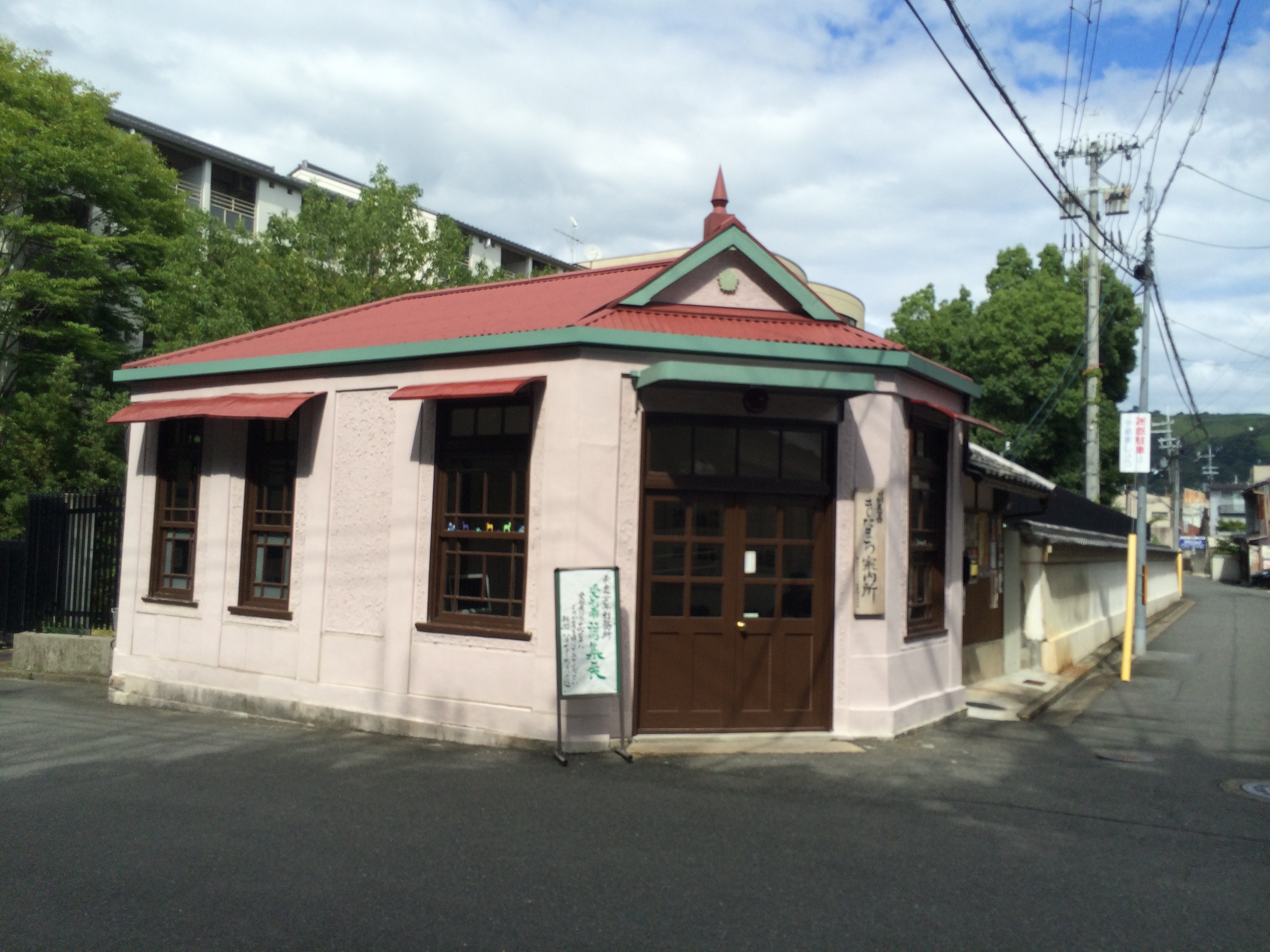 旧鍋屋交番、奈良きたまち